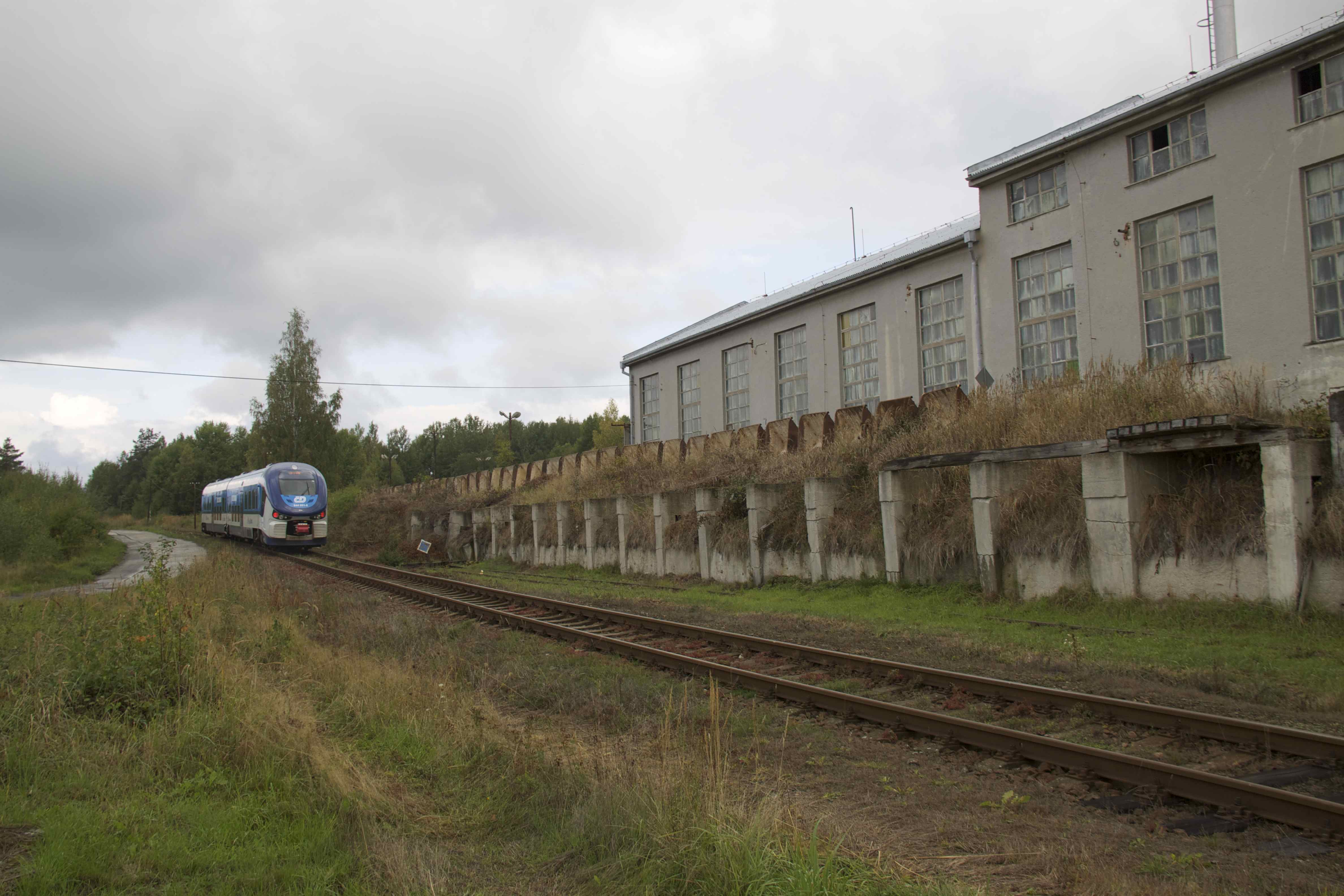 Lasselsberger, Betrieb Vonšov